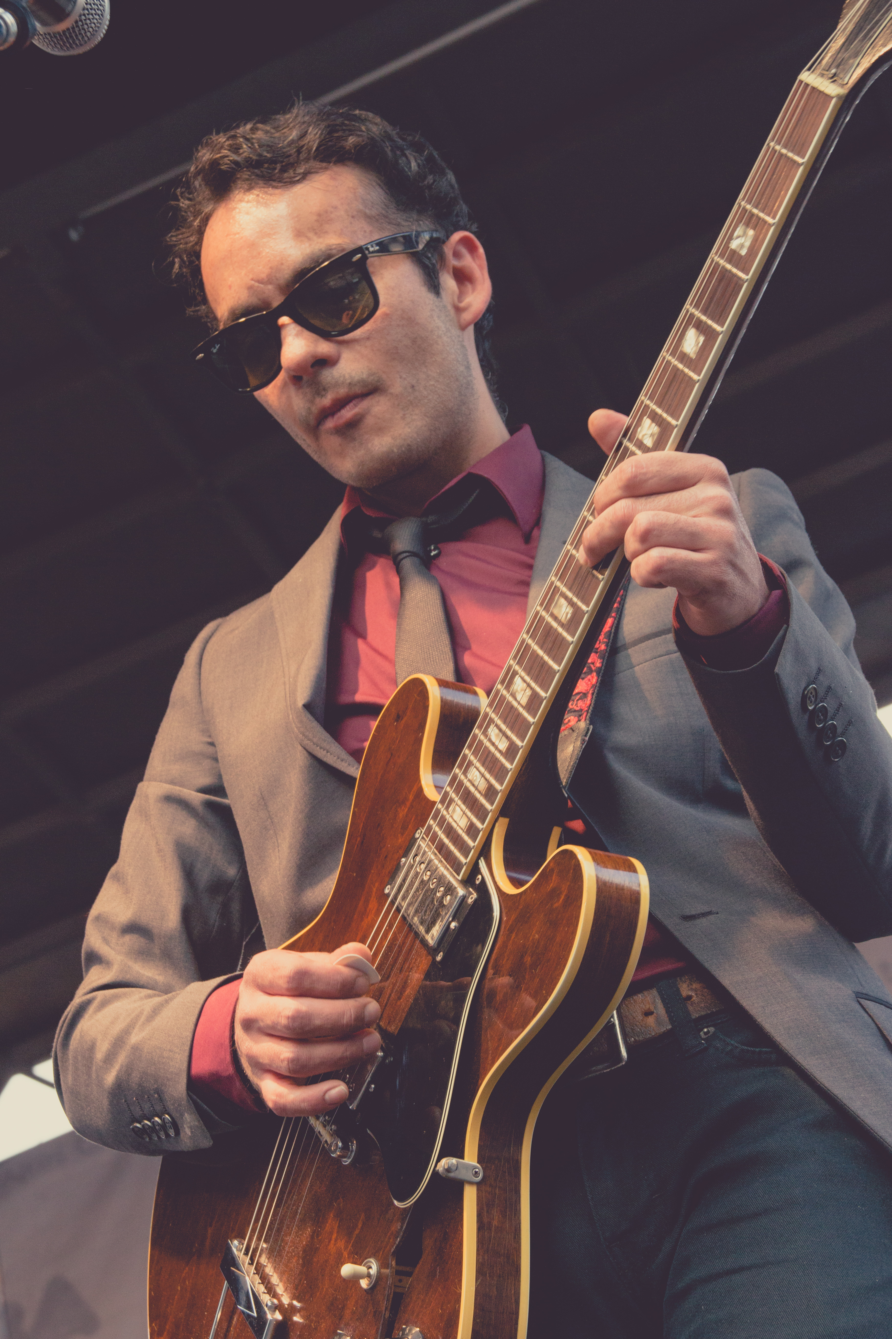 En Buenos Aires celebra Chile